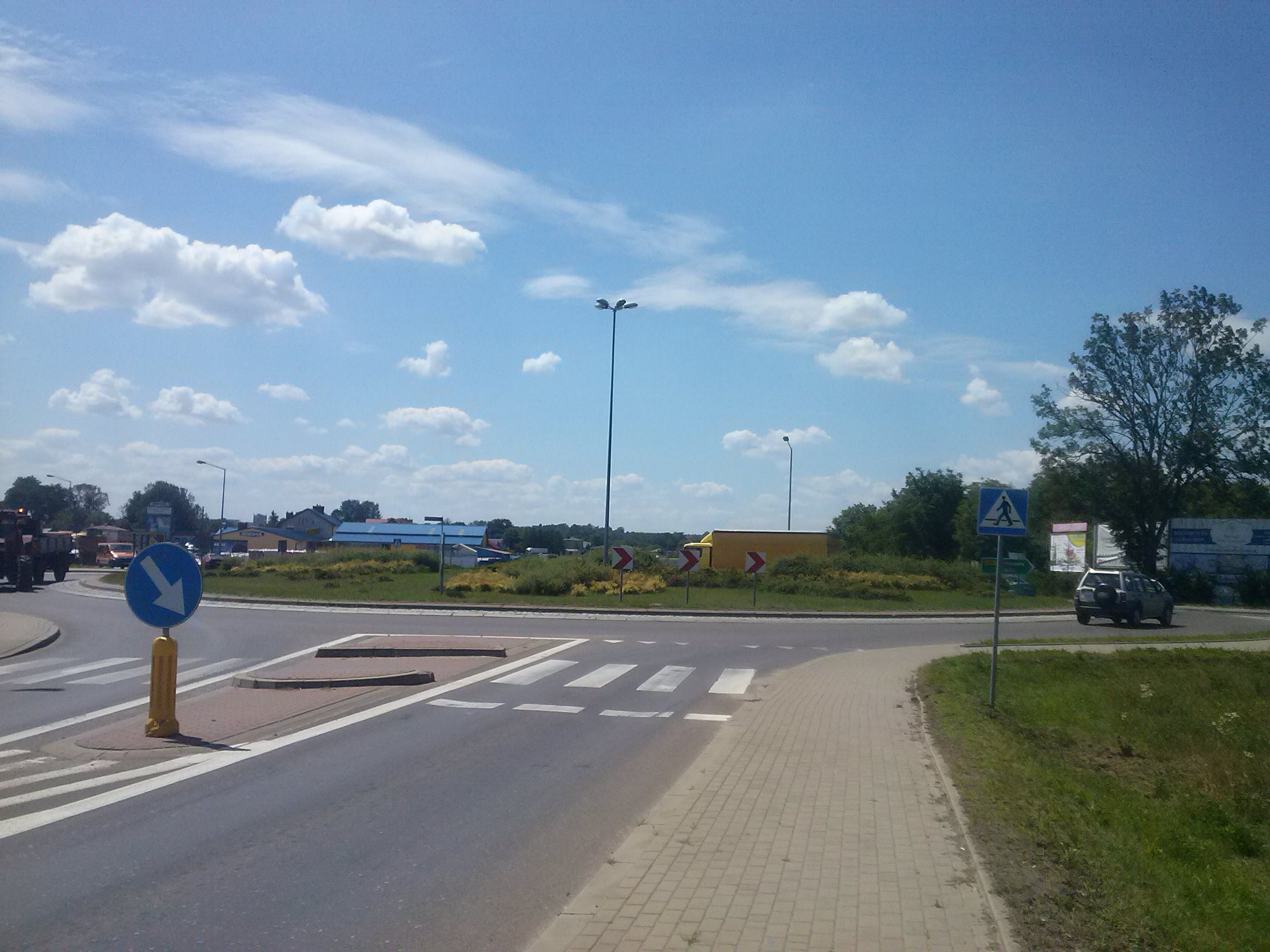 Rondo w Szówsku - rozjazd na Jarosław, Łazy, Bełżec i Sieniawę